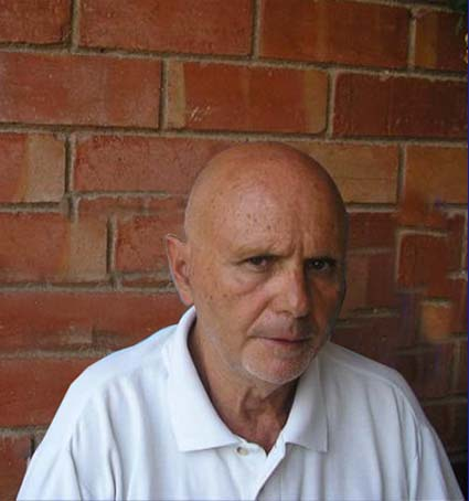 Retrato Eduardo Quiles.